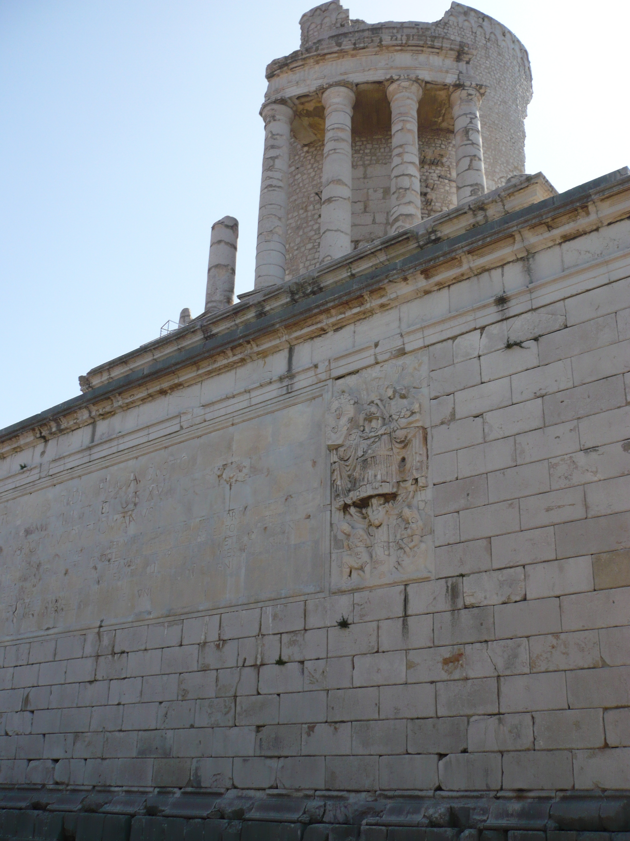 Tropaeum Alpium, La Turbie, France